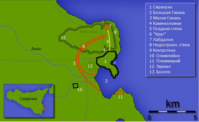 Русифицированная версия